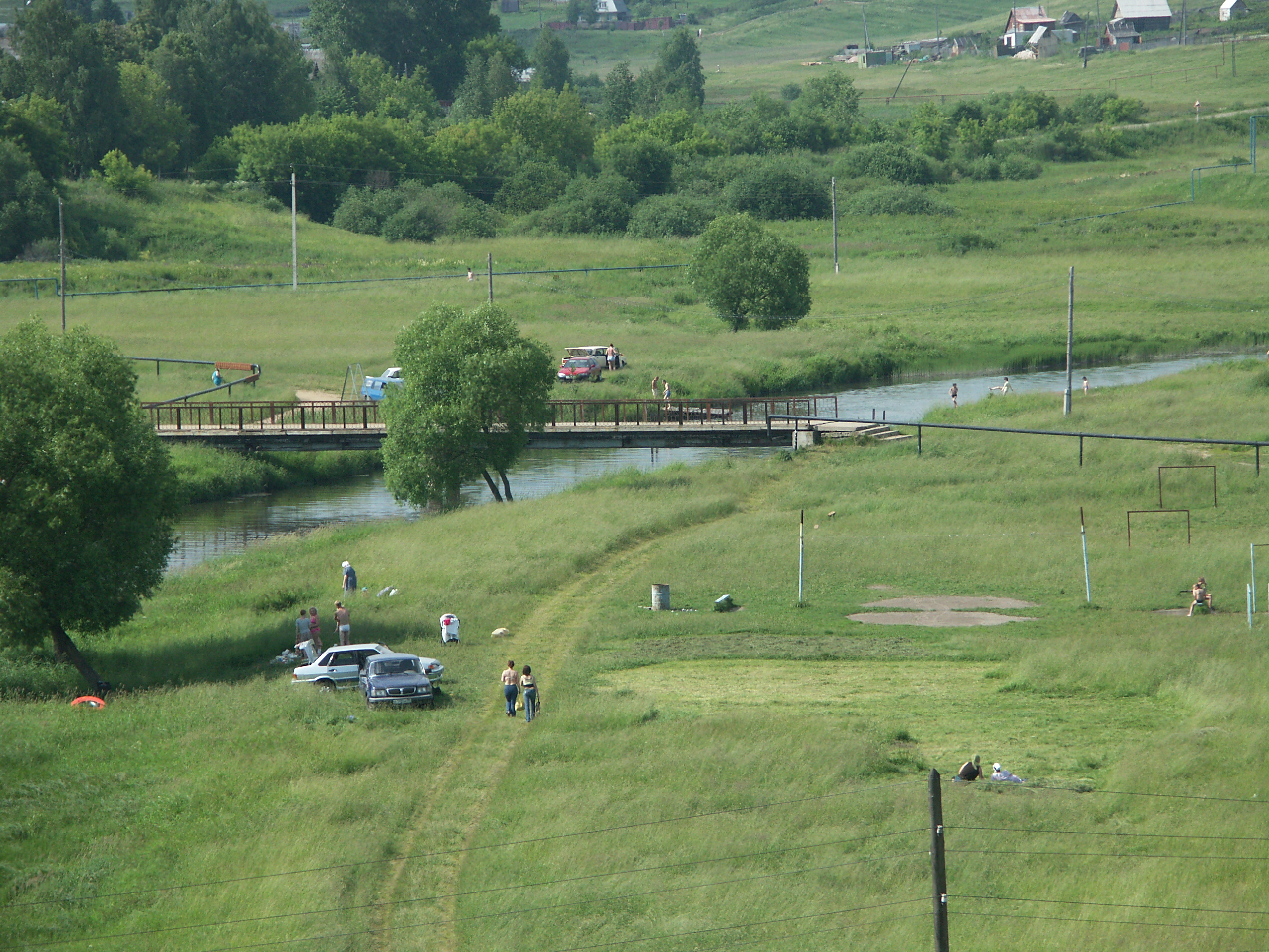 Река Серая в Александрове (вид с моста "Чугунка") Author: Алексей (User:Glaue2dk)